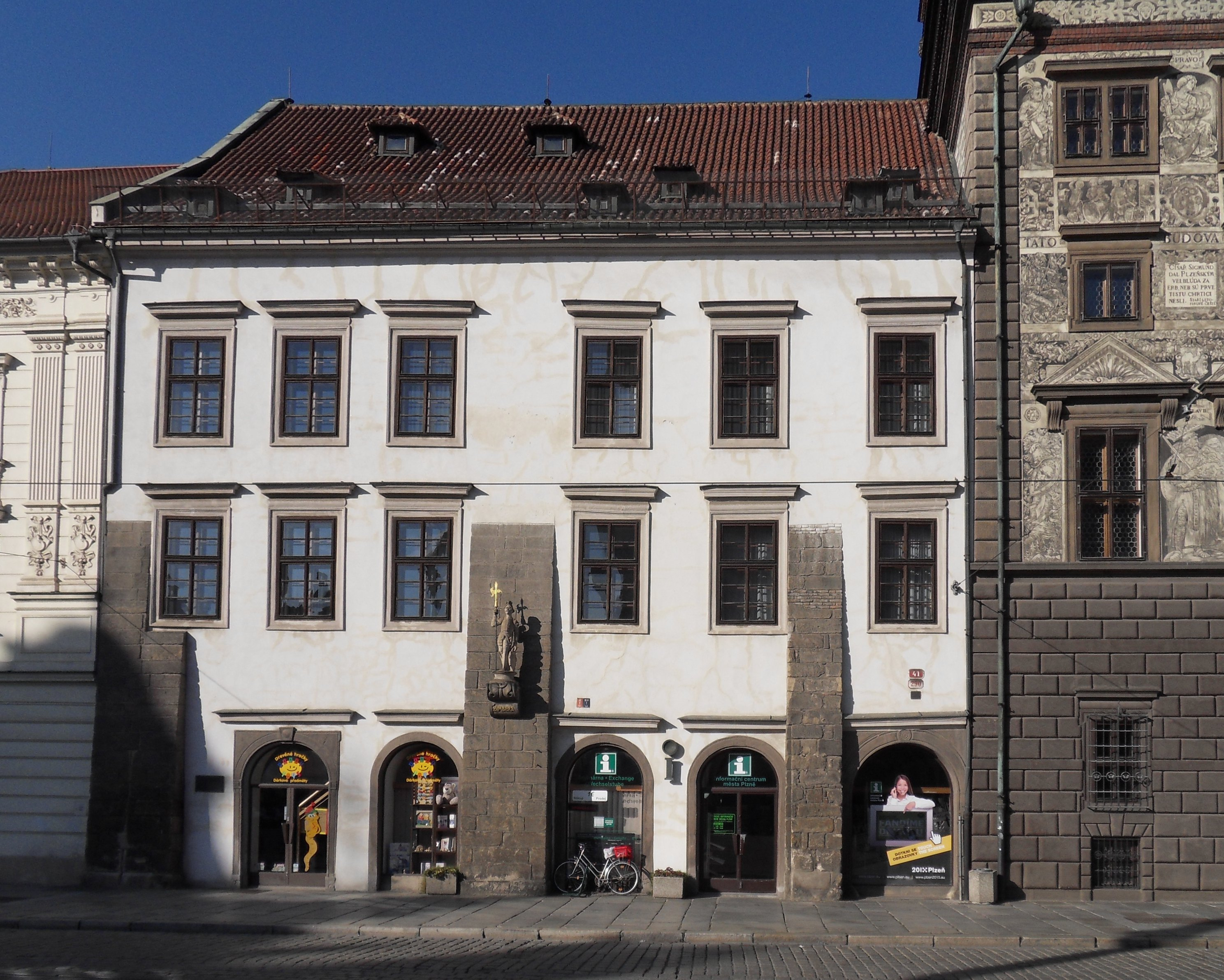 Měšťanský dům - Císařský, čp. 290, nám. Republiky 41, Plzeň